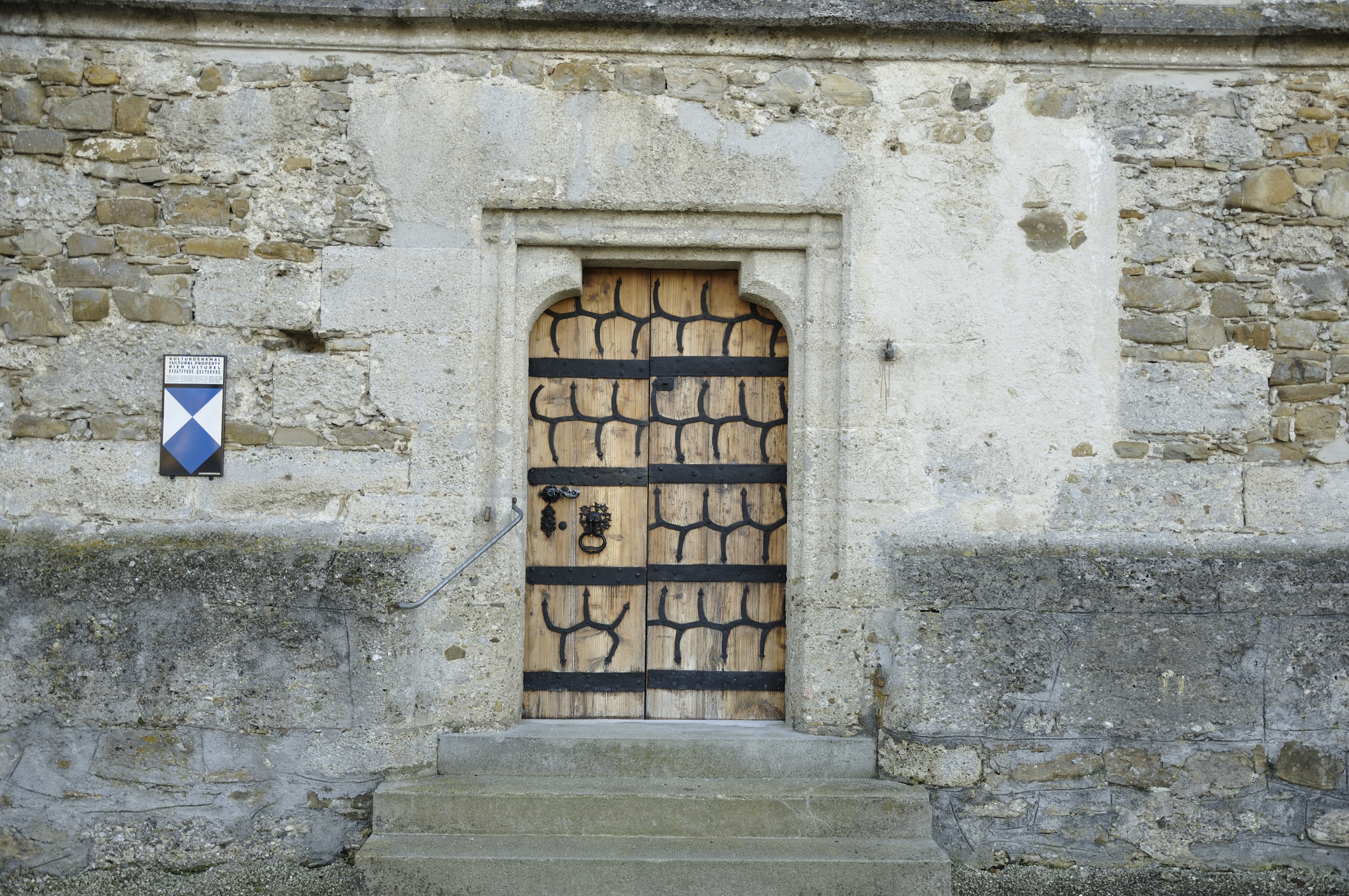 Gotische Beschläge am Nordportal der Nußbacher Pfarrkirche